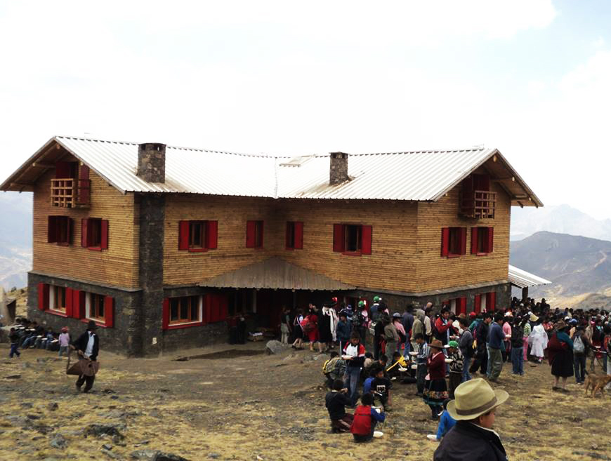 Refugio Contrahierbas en el sector Cajavilca a 4200 msnm